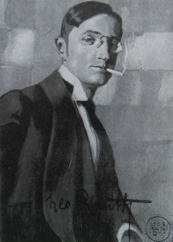 Selbstporträt